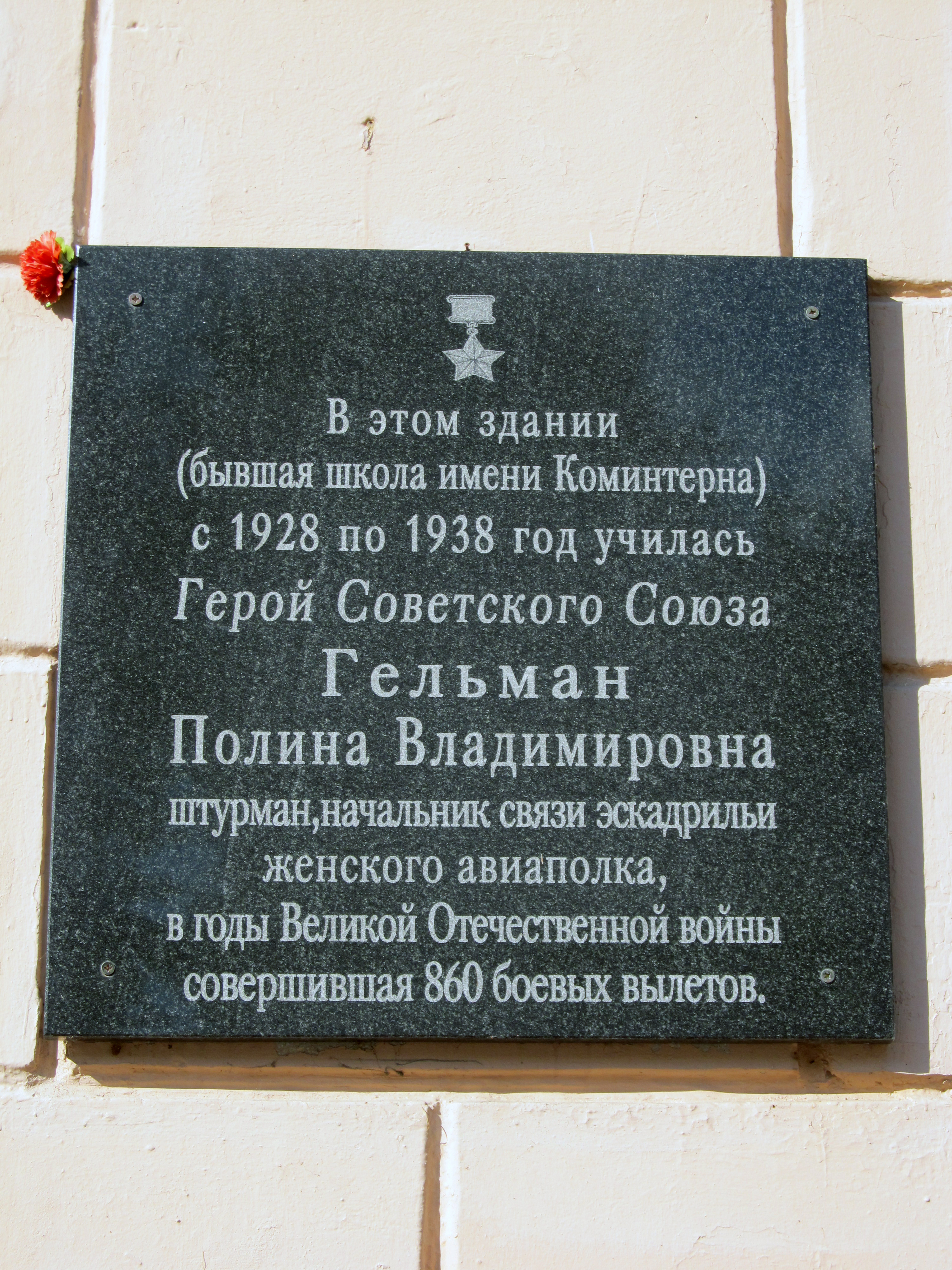 Беларуская (тарашкевіца): Будынак былой жаночай гімназіі. г. Гомель This is a photo of Belarusian heritage monument. Reference number: 313Г000008 ( WLM)